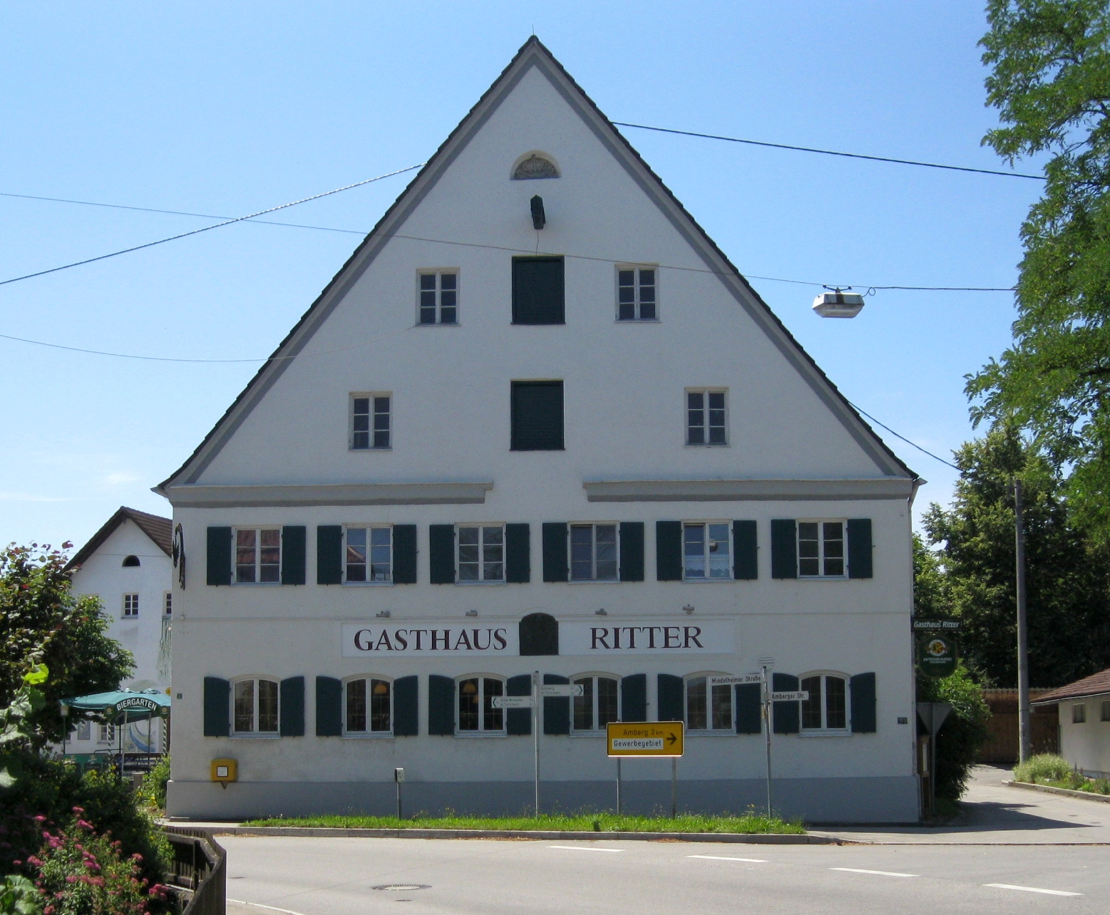 Gasthaus Ritter in Wiedergeltingen, Ostseite